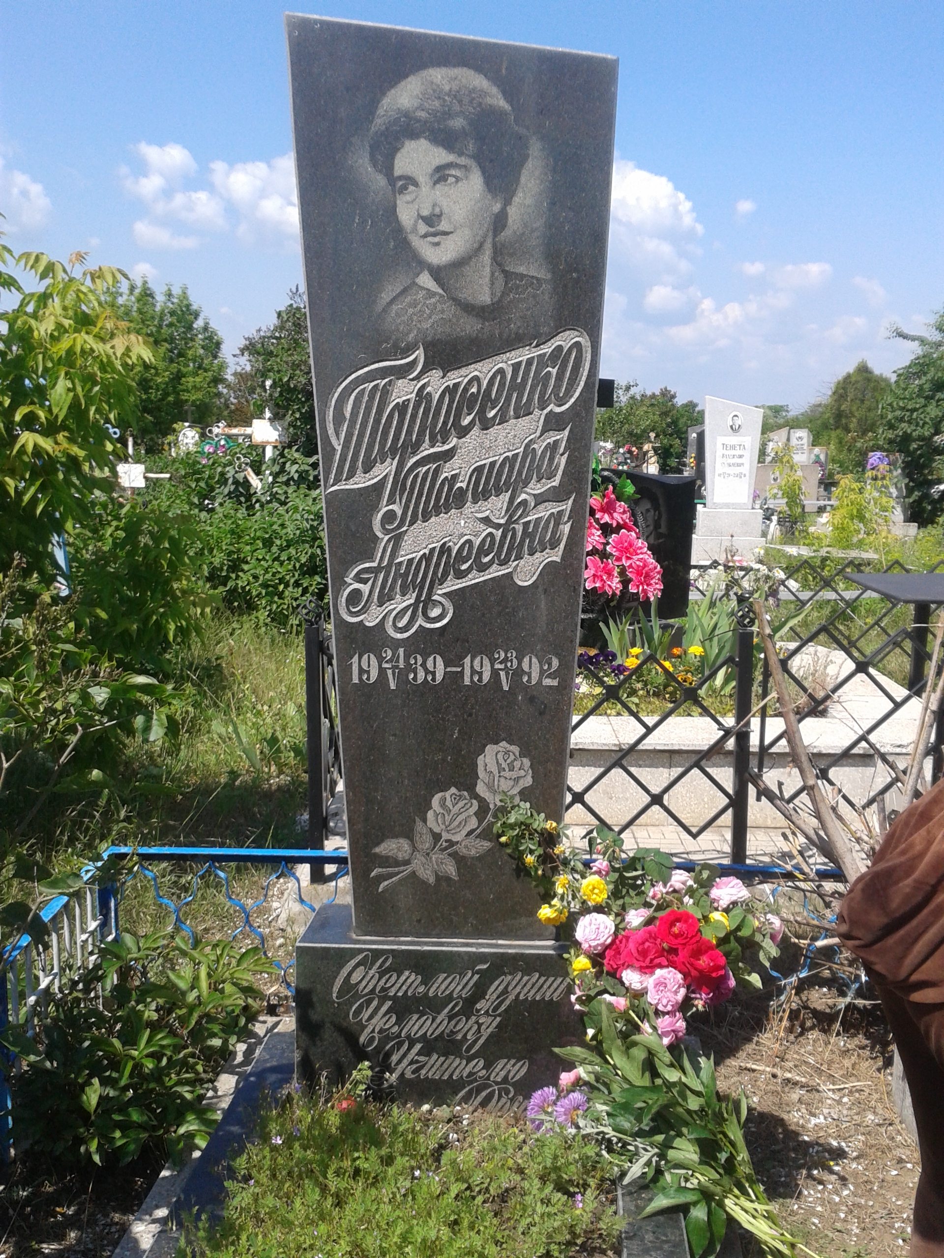 Надгробный памятник Т.А.Тарасенко (Одесса, Северное кладбище).